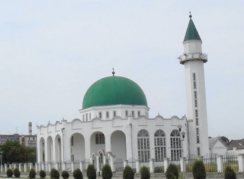 Мечеть в Нарткале